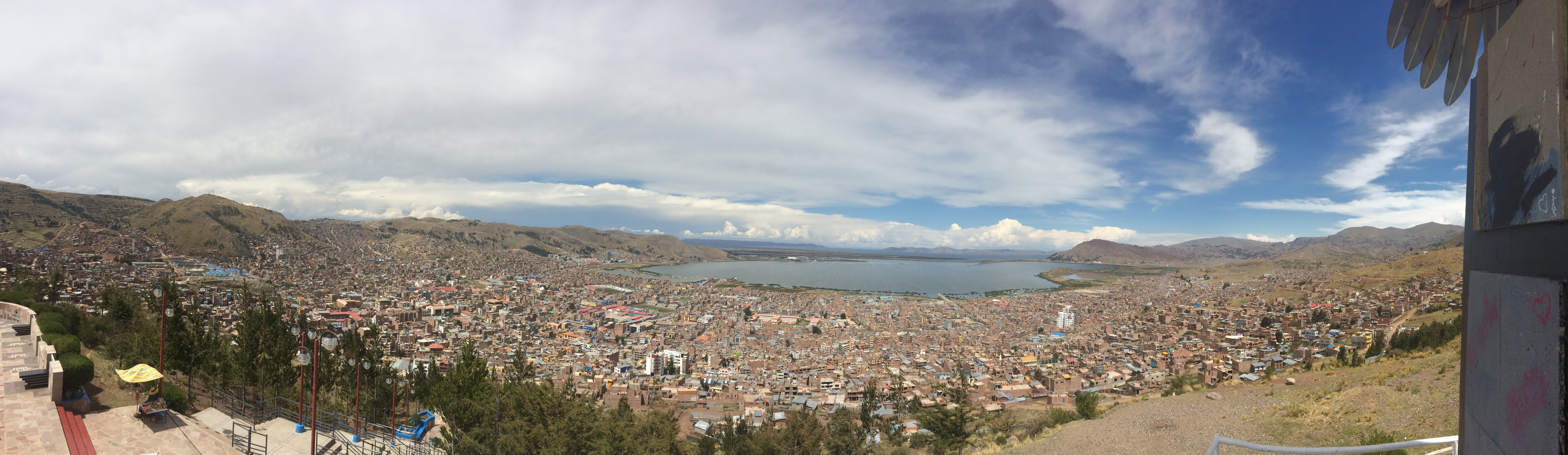 Uitzicht over Puno vanaf de Mirador del Condor